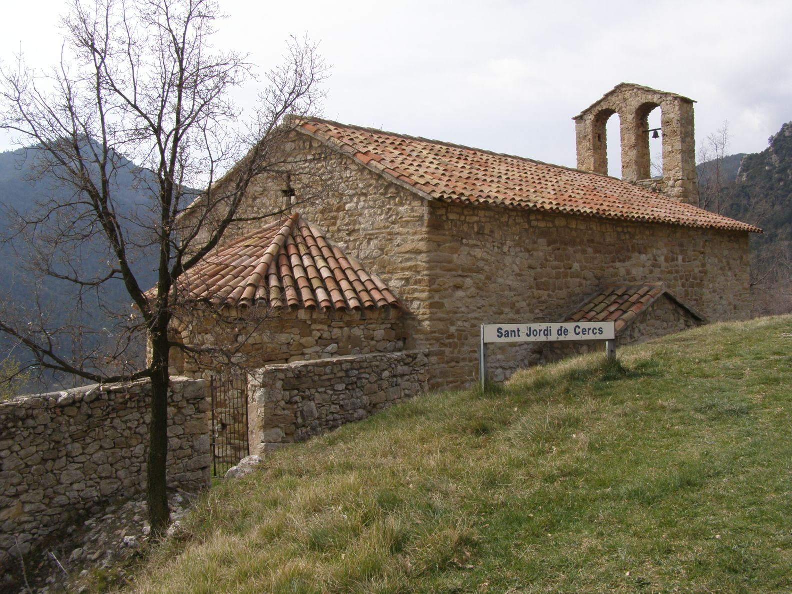 Església de sant Jordi de Cercs